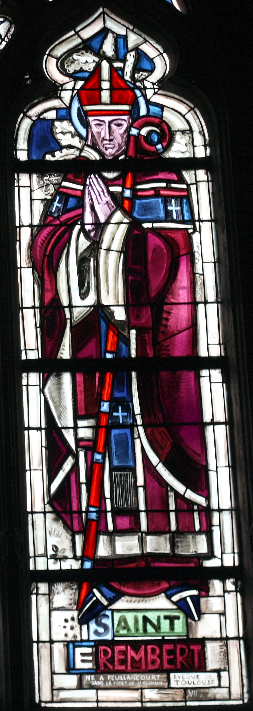 Bleiglasfenster (Ausschnitt) in der katholischen Pfarrkirche Notre-Dame in Poissy, Darstellung: hl. Érembert de Toulouse